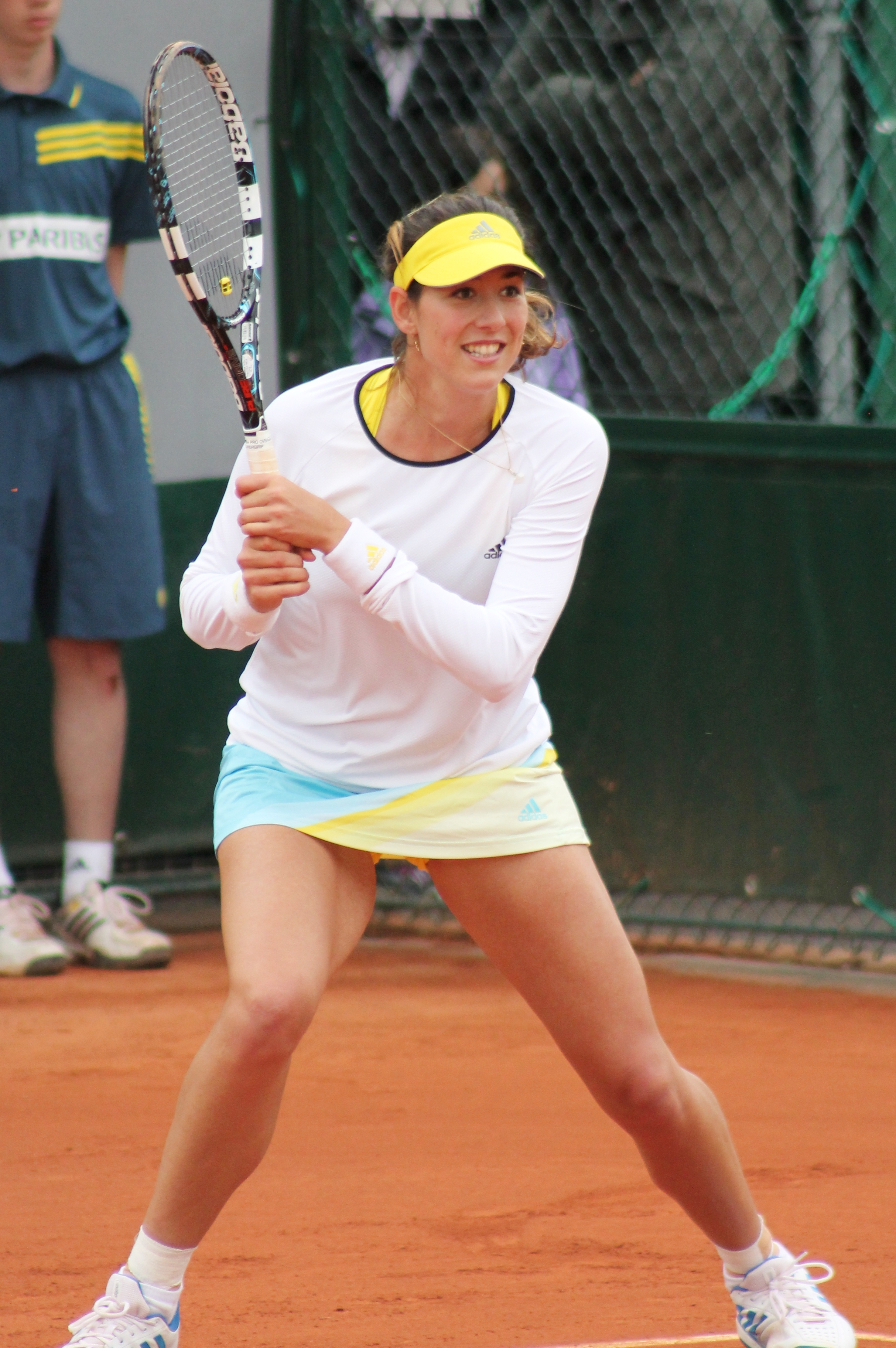 Muguruza RG13 (3)